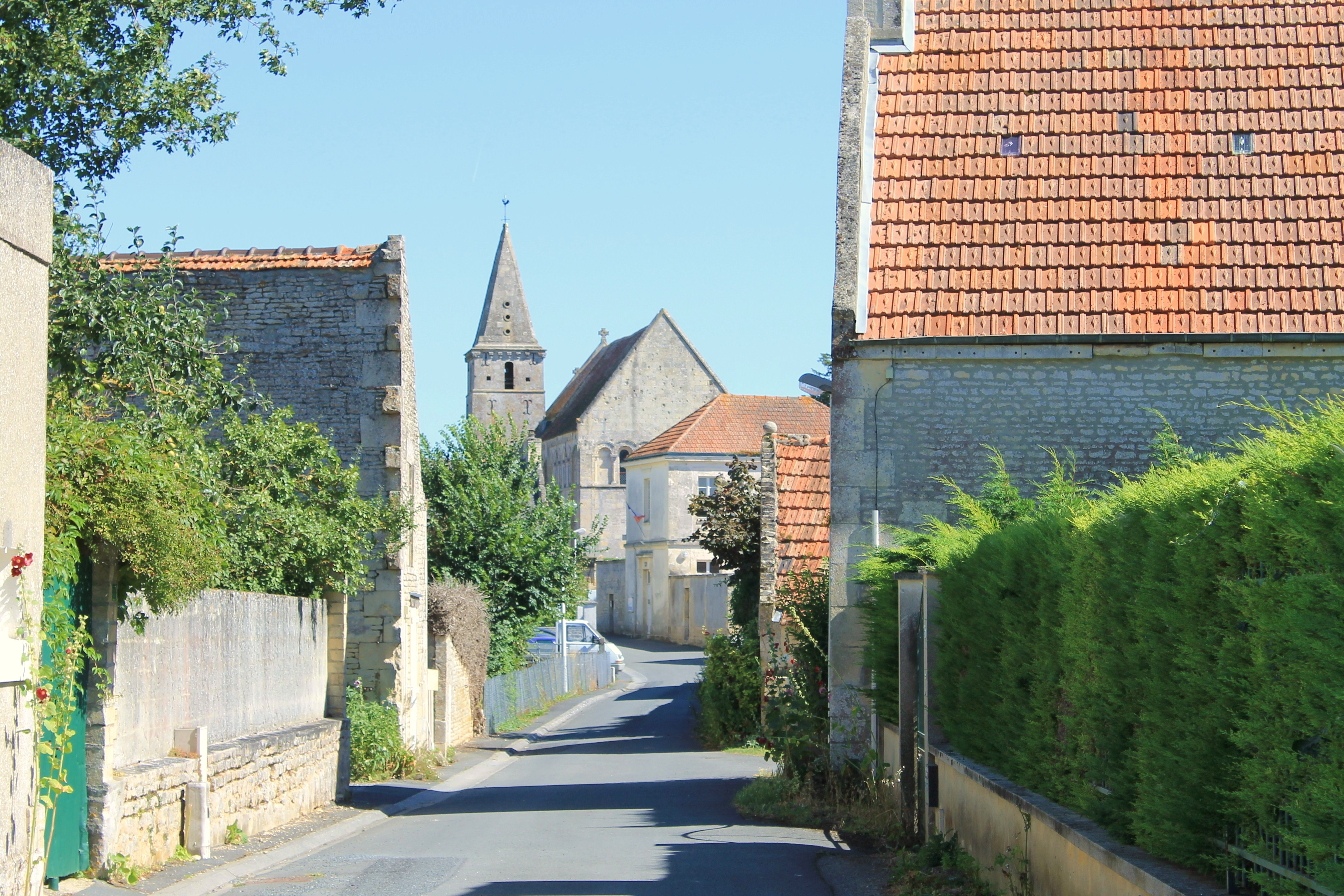 Rue du Prieuré à Cintheaux (mairie et église St-Germain) (Calvados)